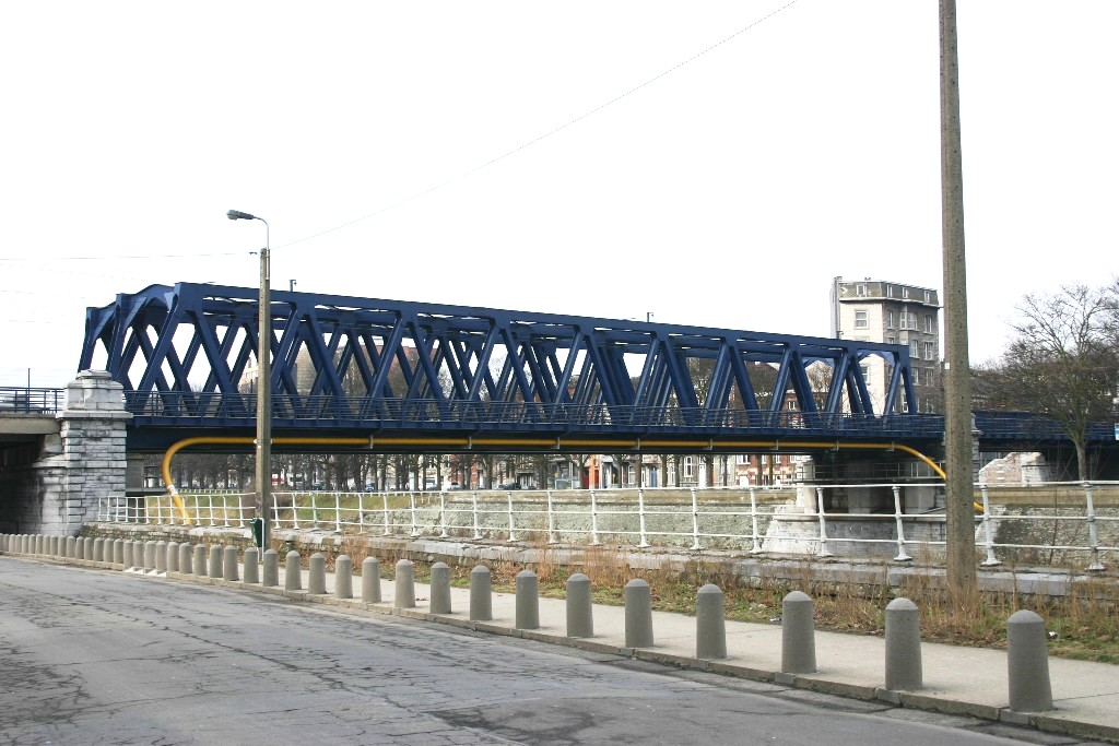 Pont de Namur.